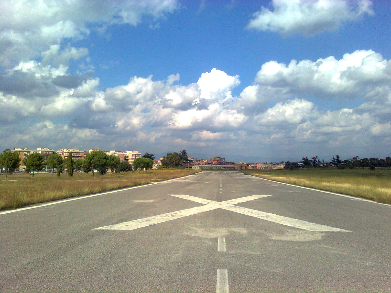 Parco di Centocelle This is a photo of a monument which is part of cultural heritage of Italy.